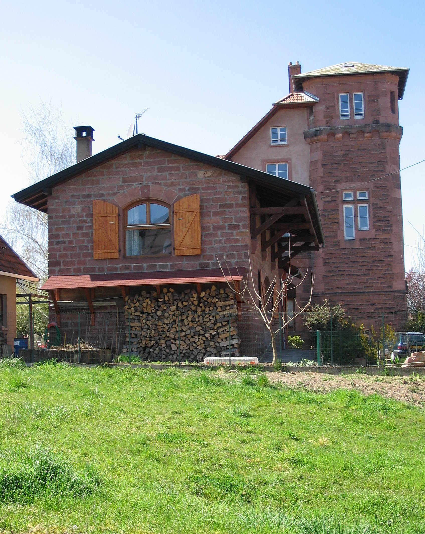 ancienne gare de Wasselonne (Bas-Rhin) sur la ligne Molsheim-Saverne